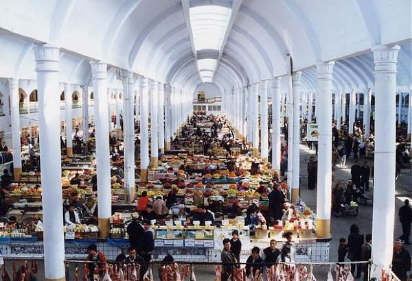 Тоҷикӣ: Бозори "Панҷшанбе" дар ш. Хуҷанд